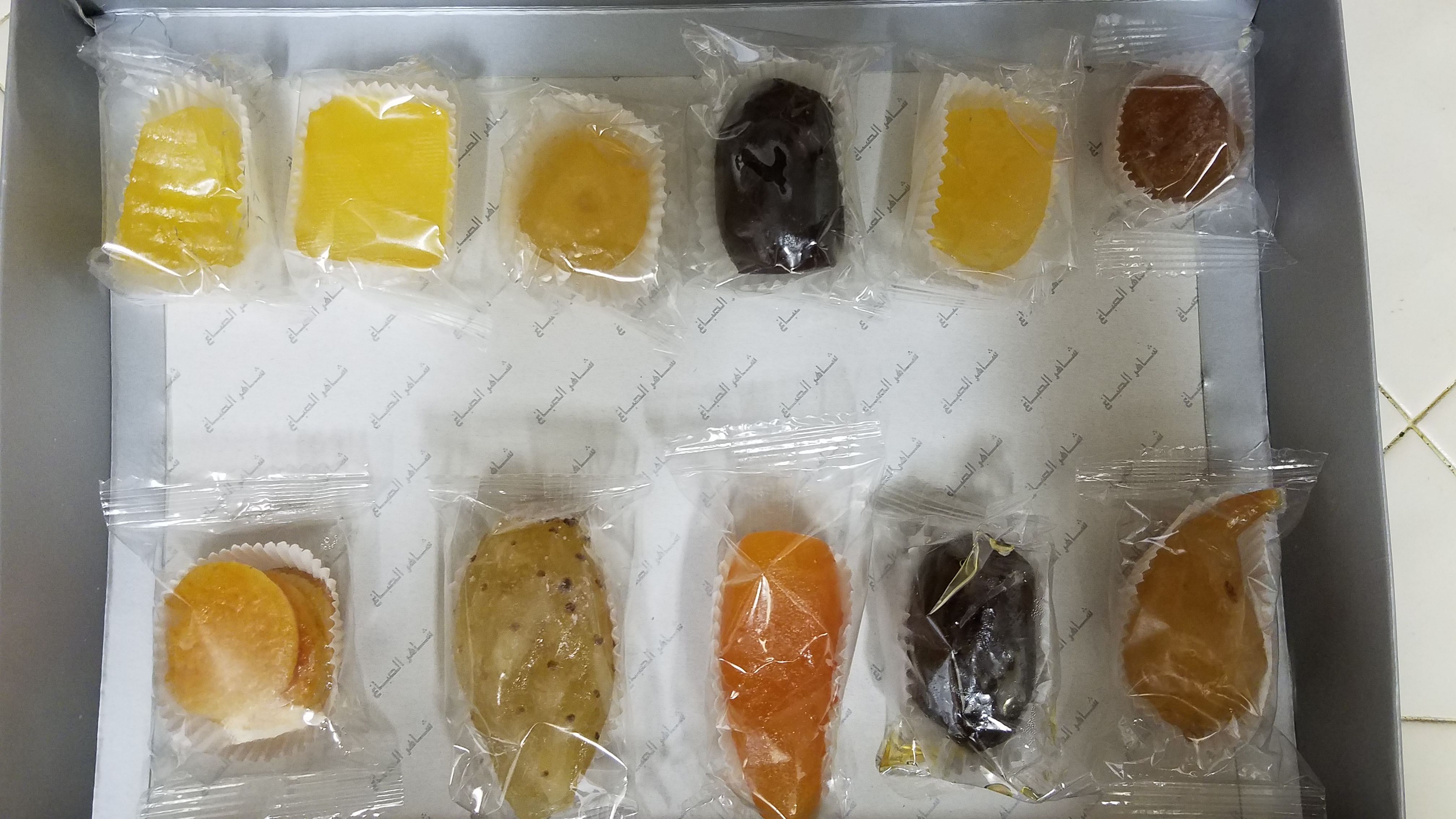 صورة لبعض أنواع المربيات الحلبية. الترتيب من اليمين إلى اليسار. الصف العلوي: مشمش، كباد، باذنجان، تفاح، قرع، قرع. الصف السفلي: إجاص، خوخ، نارنج، صبار (تين شوكي)، قشر البرتقال.